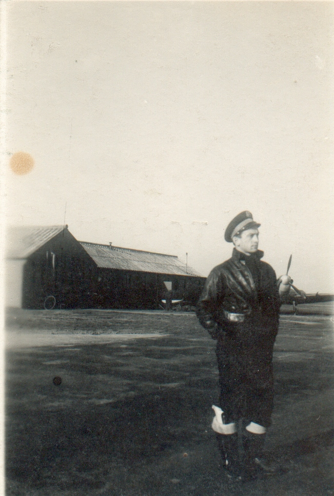 Utilisateur:Rémi GIBERT